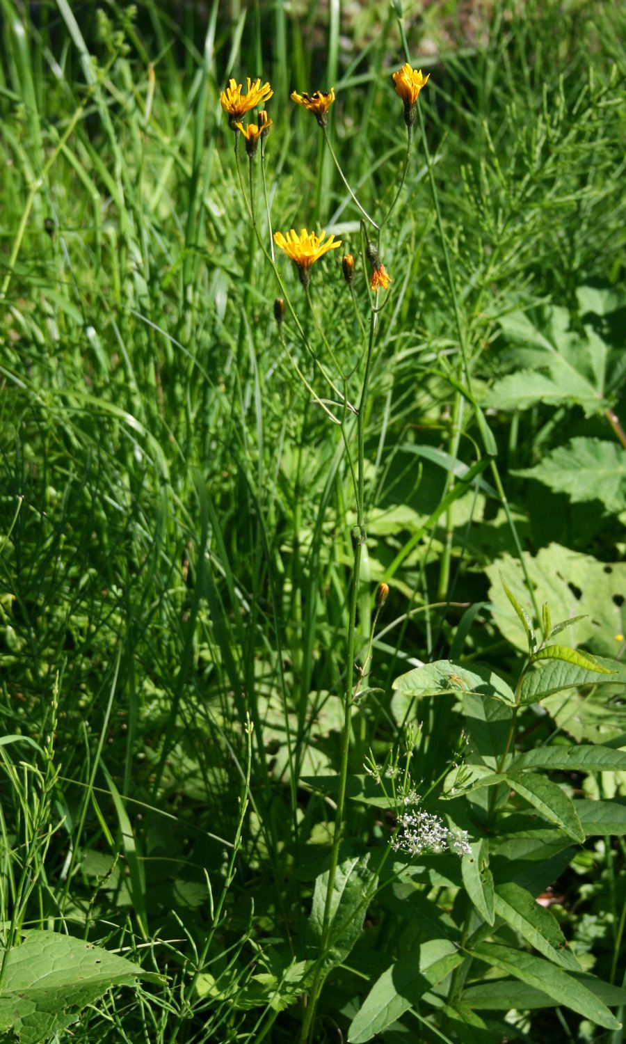 Weichhaar-Pippau (Crepis mollis), Korbblütler (Asteraceae) - Österreich/Austria/Autriche: Oberösterreich, Hausruckviertel, ca. 2 km S Forsthaus Redltal, ca. 570 m s.m.